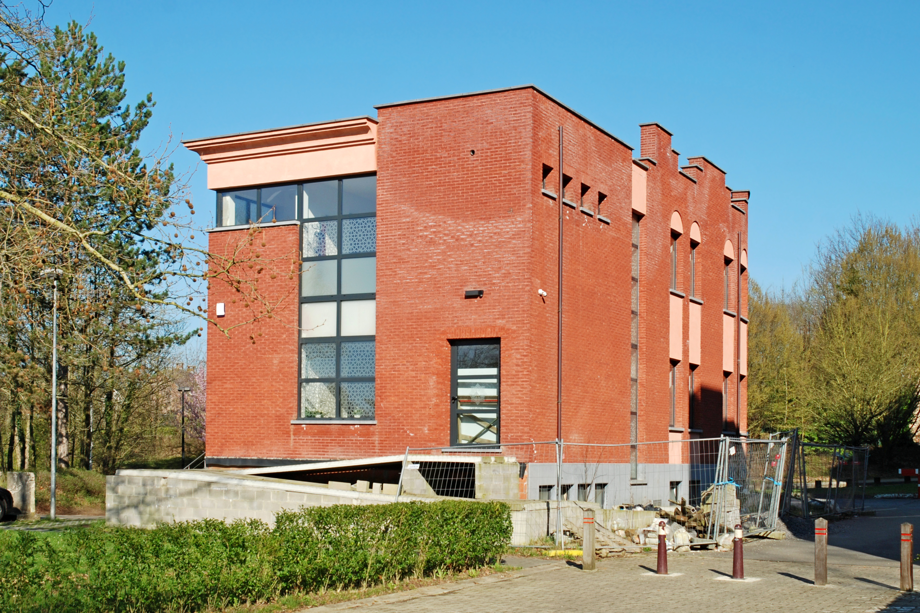 Belgique - Louvain-la-Neuve - Mosquée (architecte Miloud Bouzahzah, construction 2011-2016)